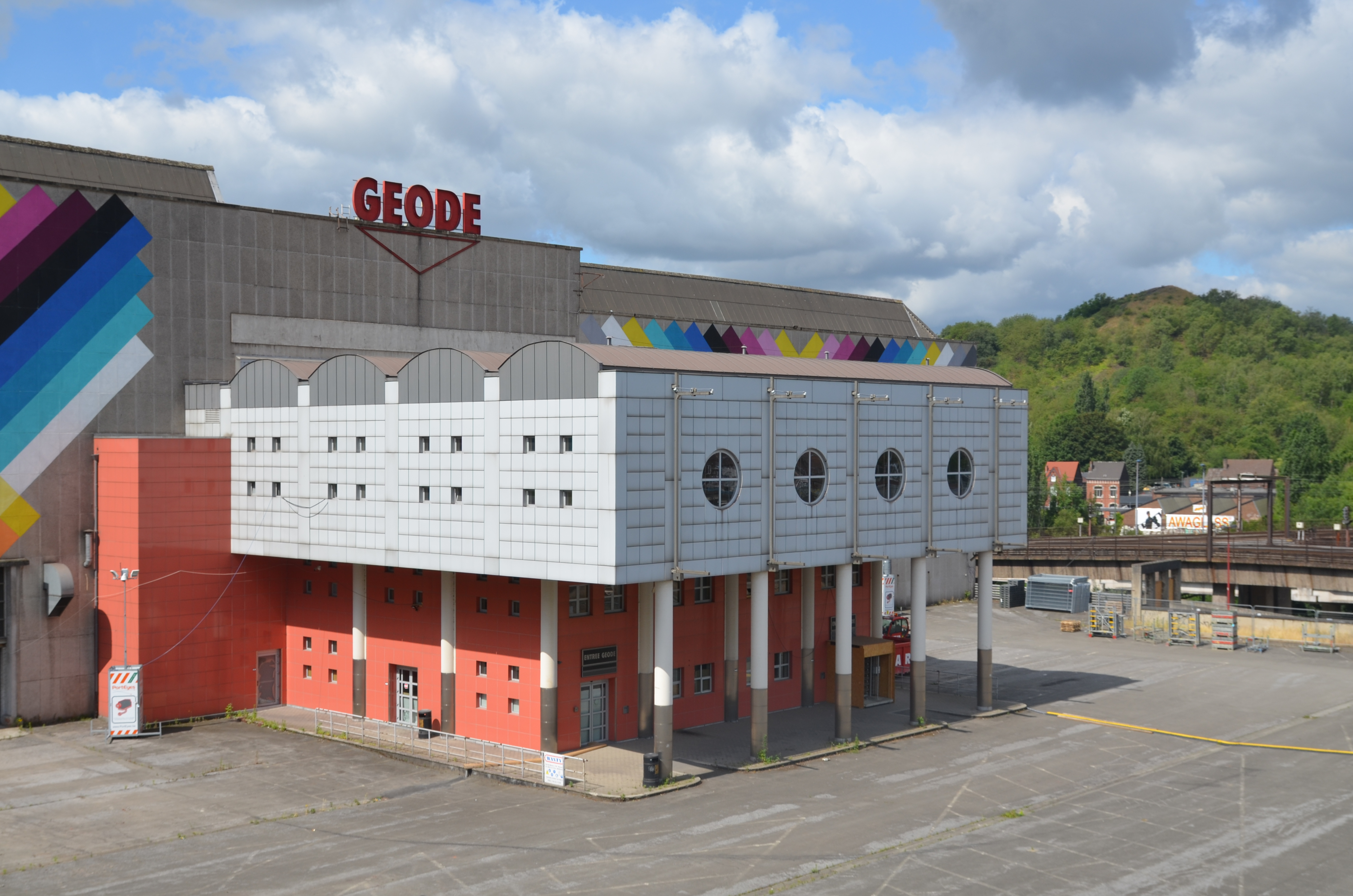 Charleroi (Belgique) - Palais des expositions. La Géode, entrée du côté des parkings.